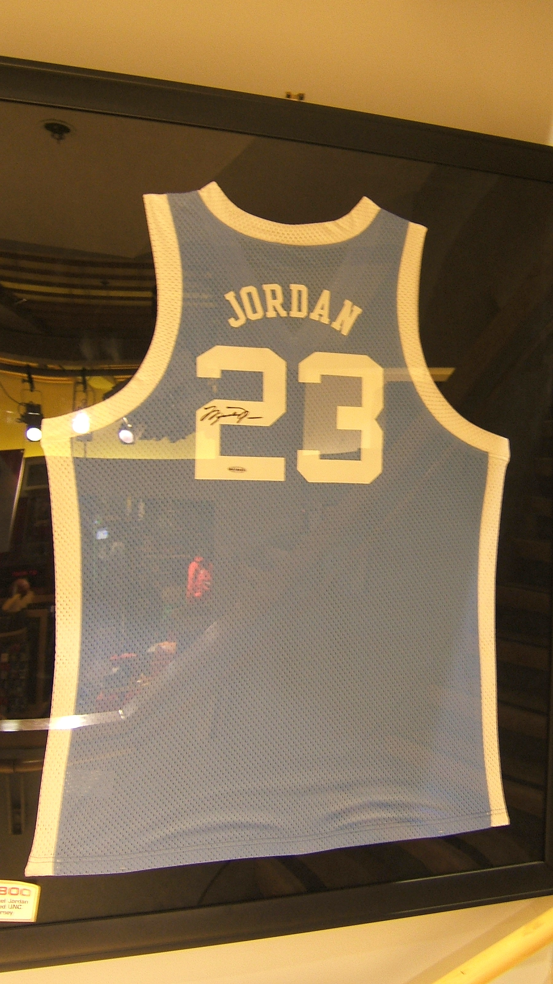 Photographie d'un cadre du jersey de North Carolina authentique de Michael Jordan dans le magasin NBA à New York à la 5ème Avenue.